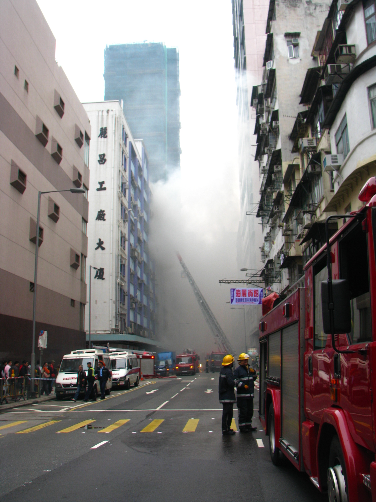 九龍長沙灣青山道麗昌工廠大廈